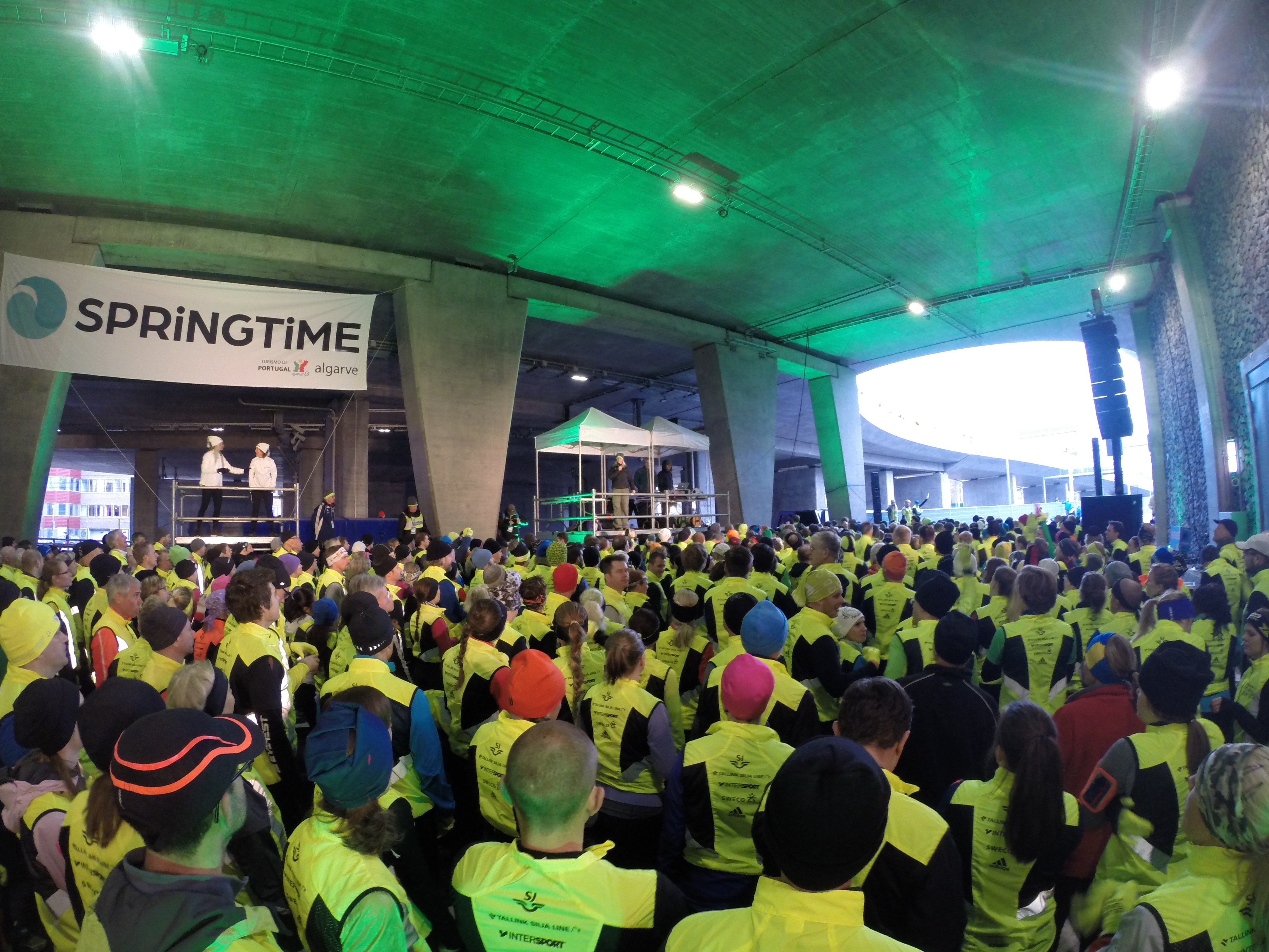 Stockholm Tunnel Run 2014, motionslopp över 10 km i Norra länken-tunnlarna innan öppning och invigning. 42 400 löpare deltog i loppet. Löpare i startfållan.